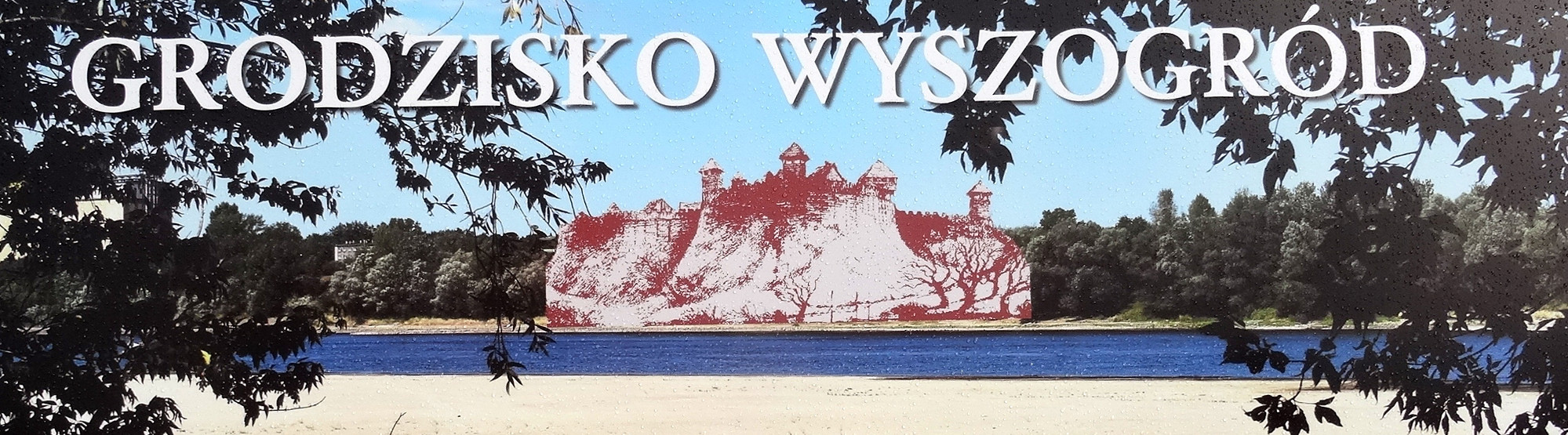 Tablice informacyjne na grodzisku Wyszogród (XI w.) w Bydgoszczy, ustawione w 2015 roku